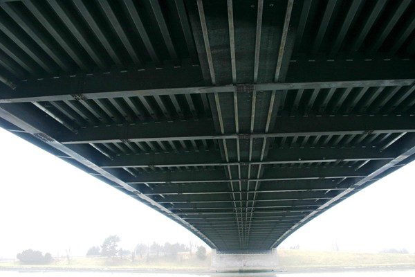 Bréck vun Haccourt - Tablier.